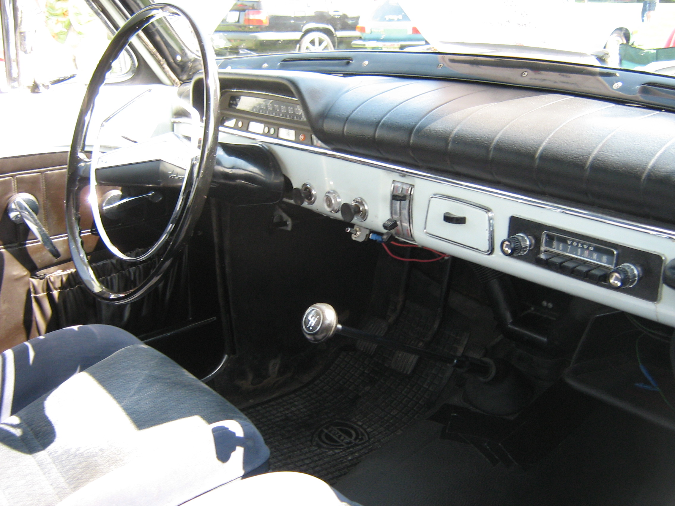 1967 Volvo 122S